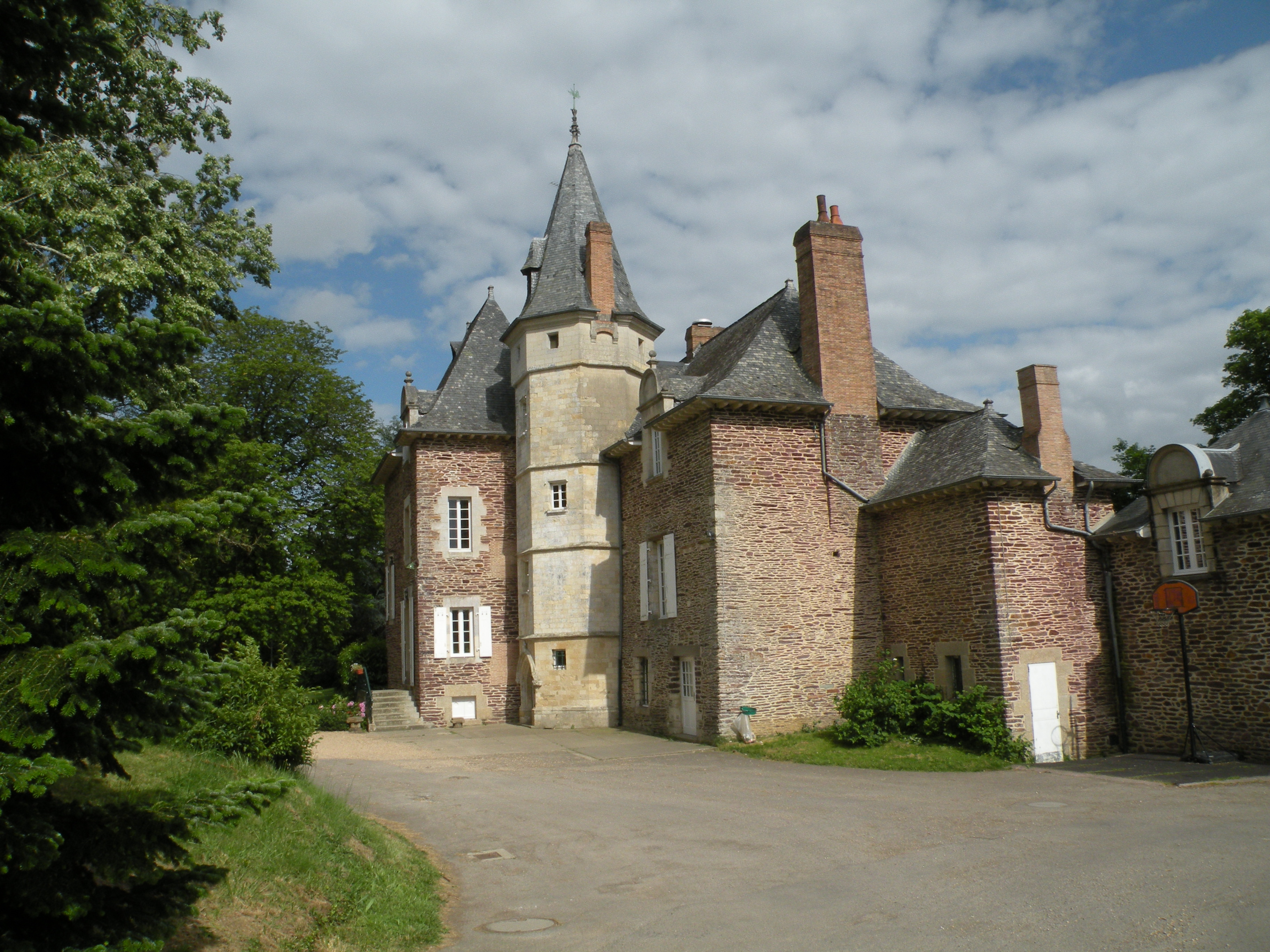 Château de Carcé à Bruz.